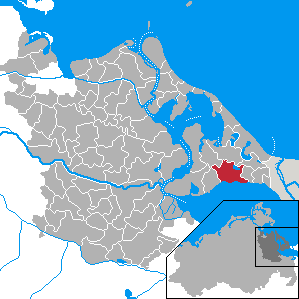 Dargen, Landkreis Ostvorpommern, Mecklenburg-Vorpommern